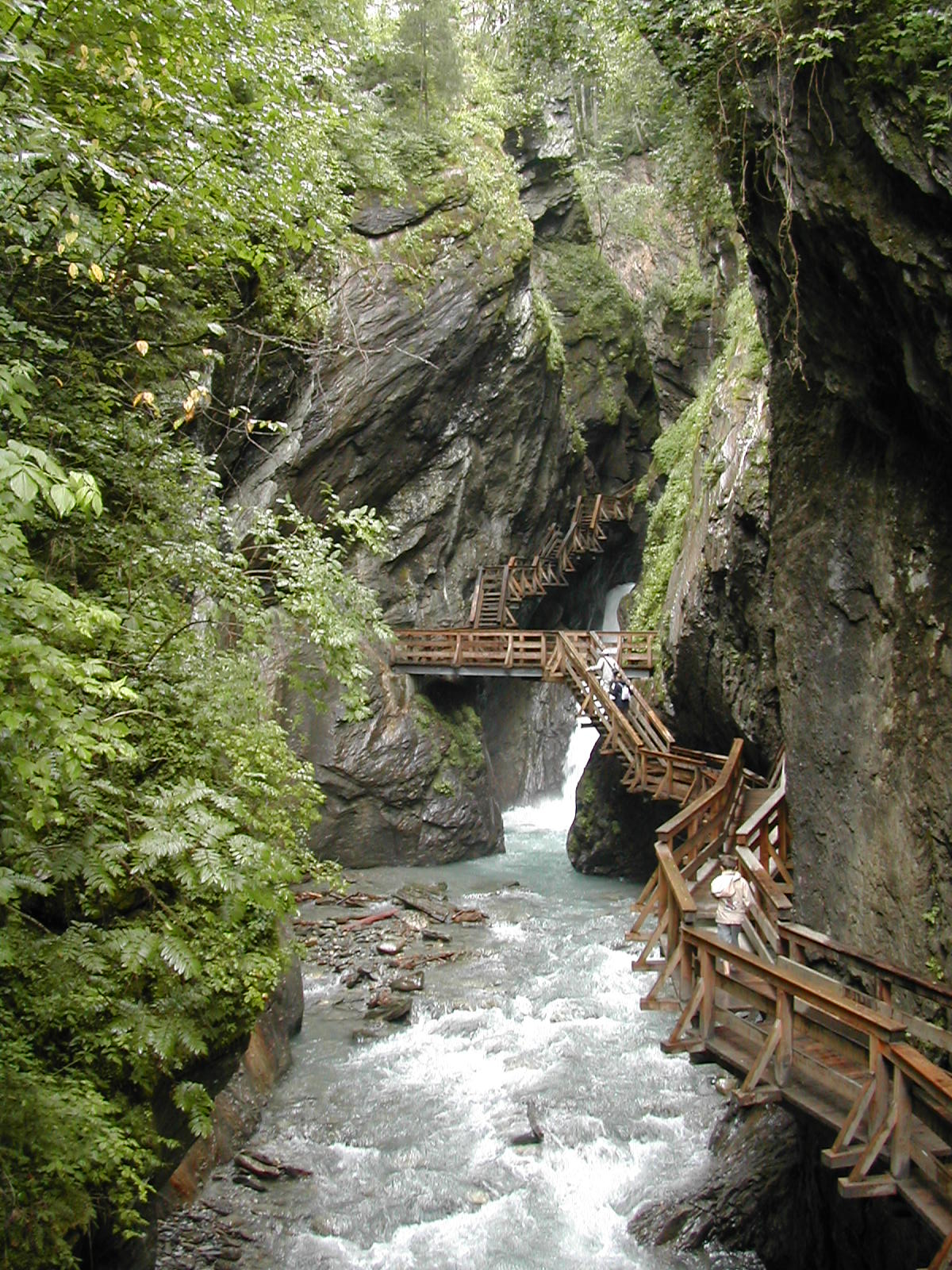 sigmund-thun-klamm This media shows the natural monument in Salzburg with the ID NDM00037.